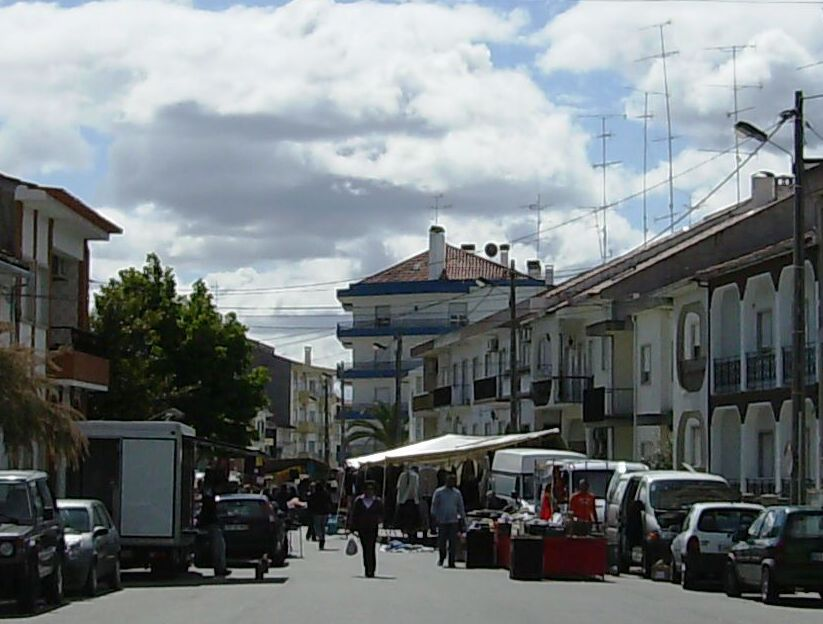 Rua do Mercado, Alcains, Castelo Branco